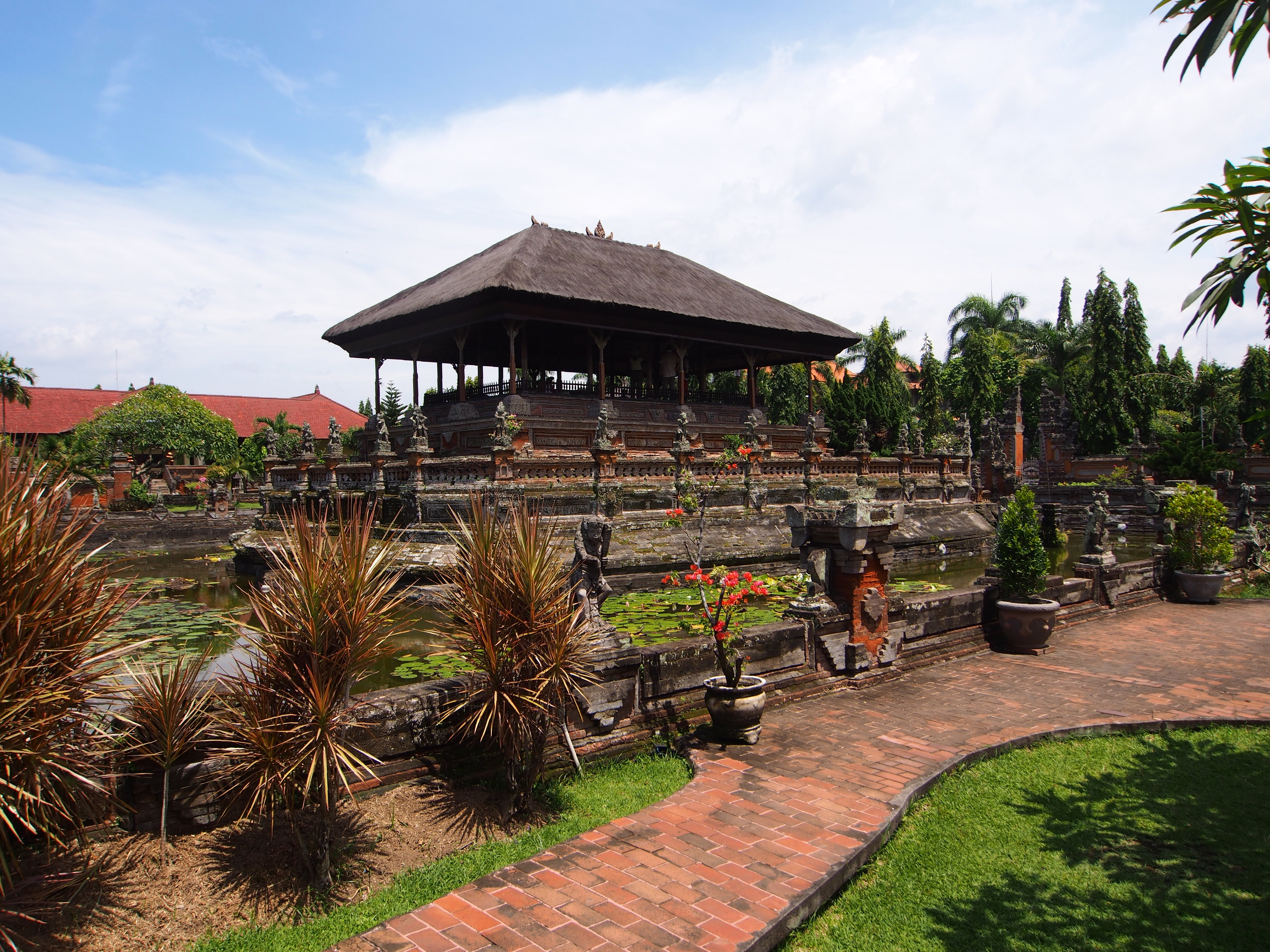 Kertha Gosa Pavilion - 2015.02